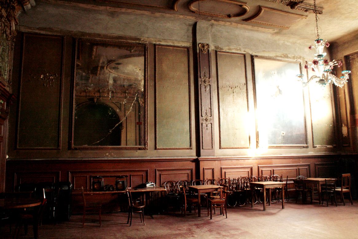 Clärchens Ballhaus, Spiegelsaal